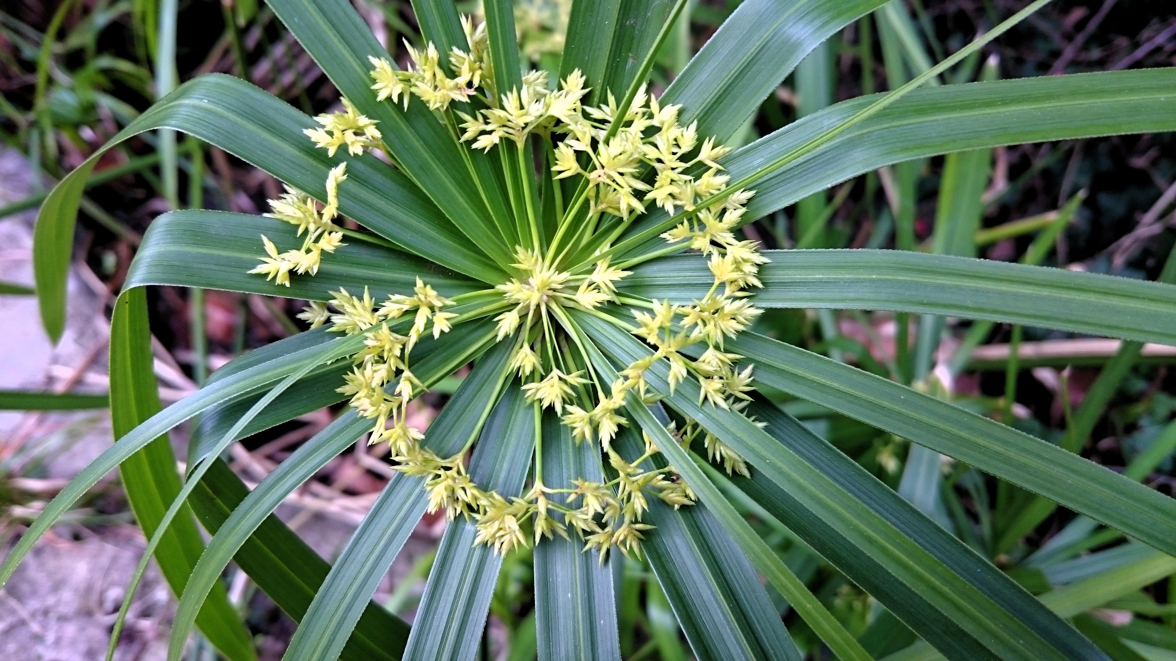 Cyperus alternifolius landarea. Papiro landarea ere esaten zaio eta gaztelaniaz "paragüita", duen itxuragatik. Landareak Madagaskarren du jatorria.